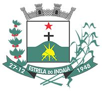 Brasão de Estrela do Indaiá